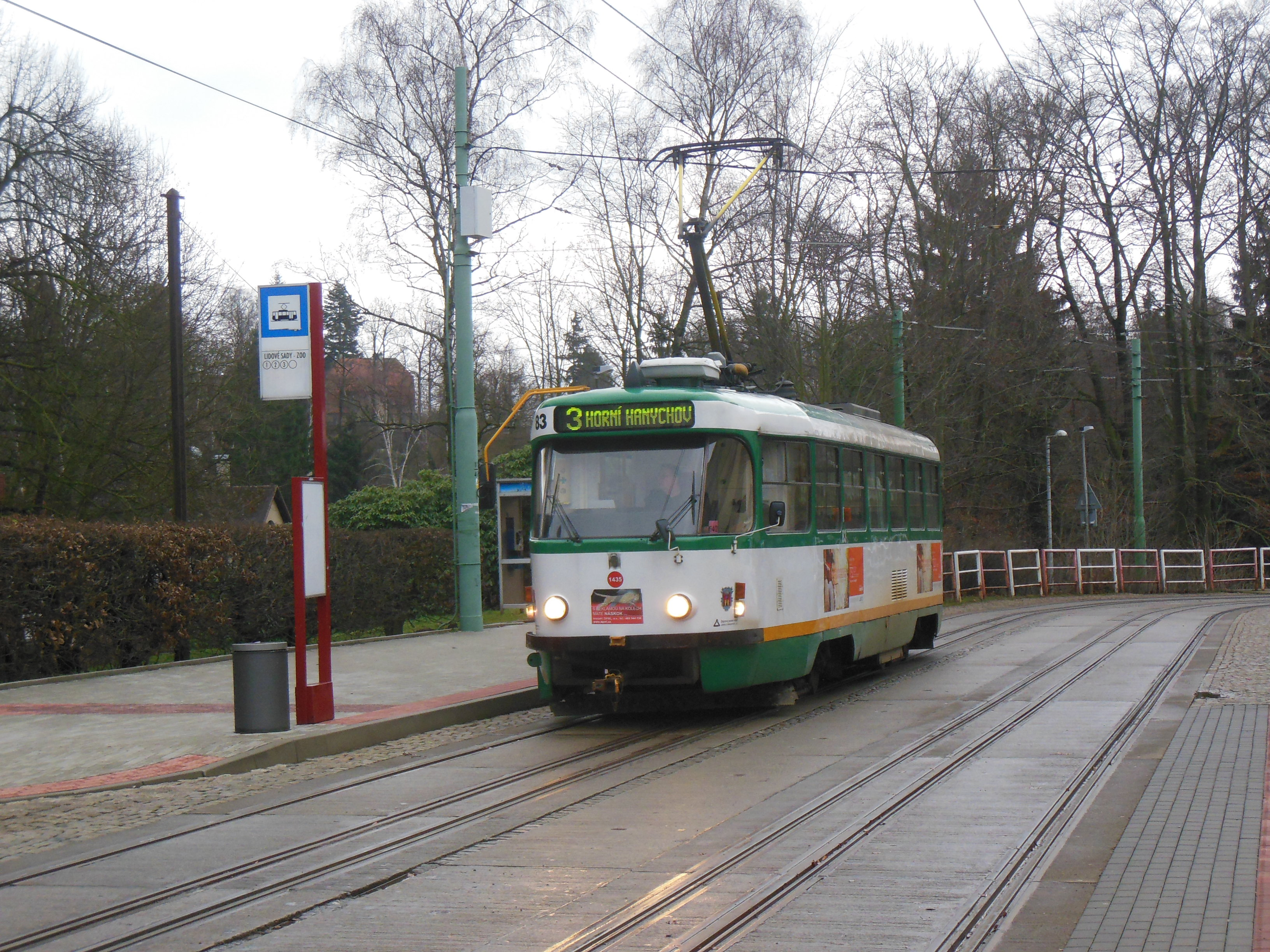 Liberec (okres Liberec). Ulice Lidové sady, tramvajová zastávka Lidové sady-ZOO, tramvaj linky 3.